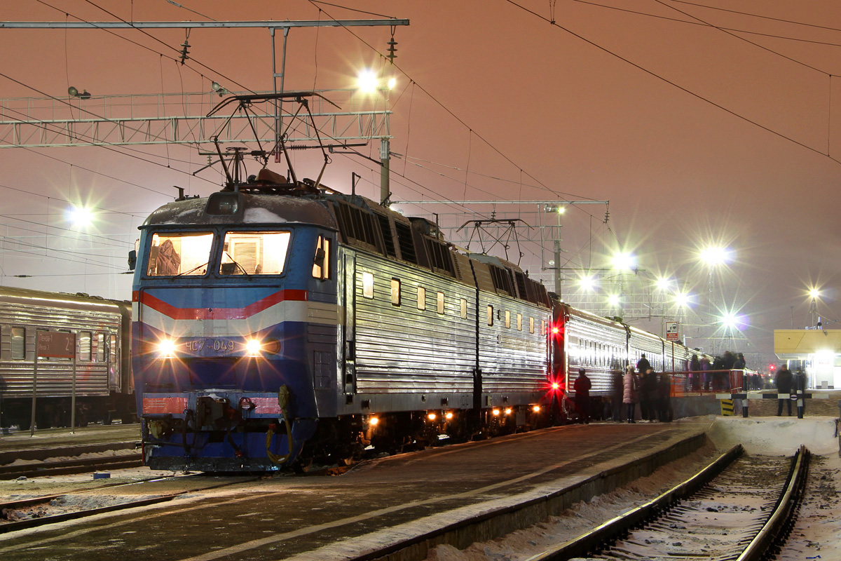 Фирменный поезд «Сура» № 52 Пенза — Москва на станции Пенза-1